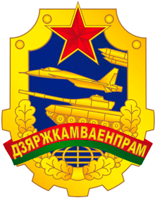 Геральдычны знак Дзяржкамваенпрама